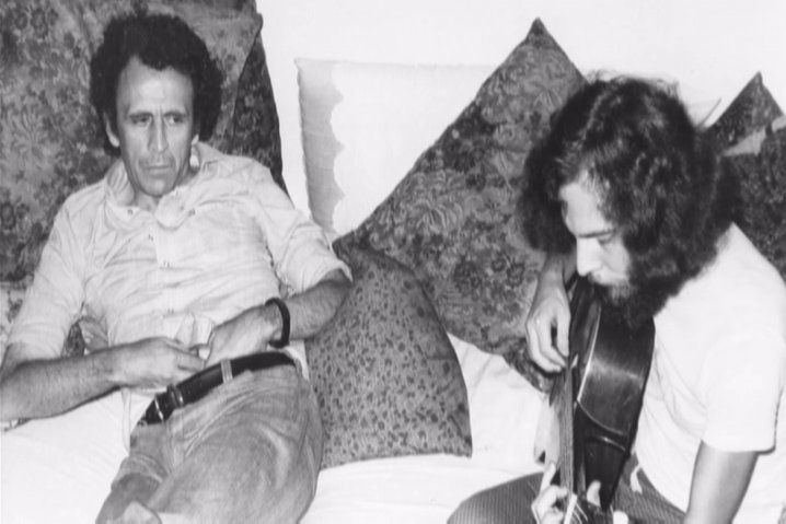 El músico Claudio Gabis con el productor Jorge Alvarez.